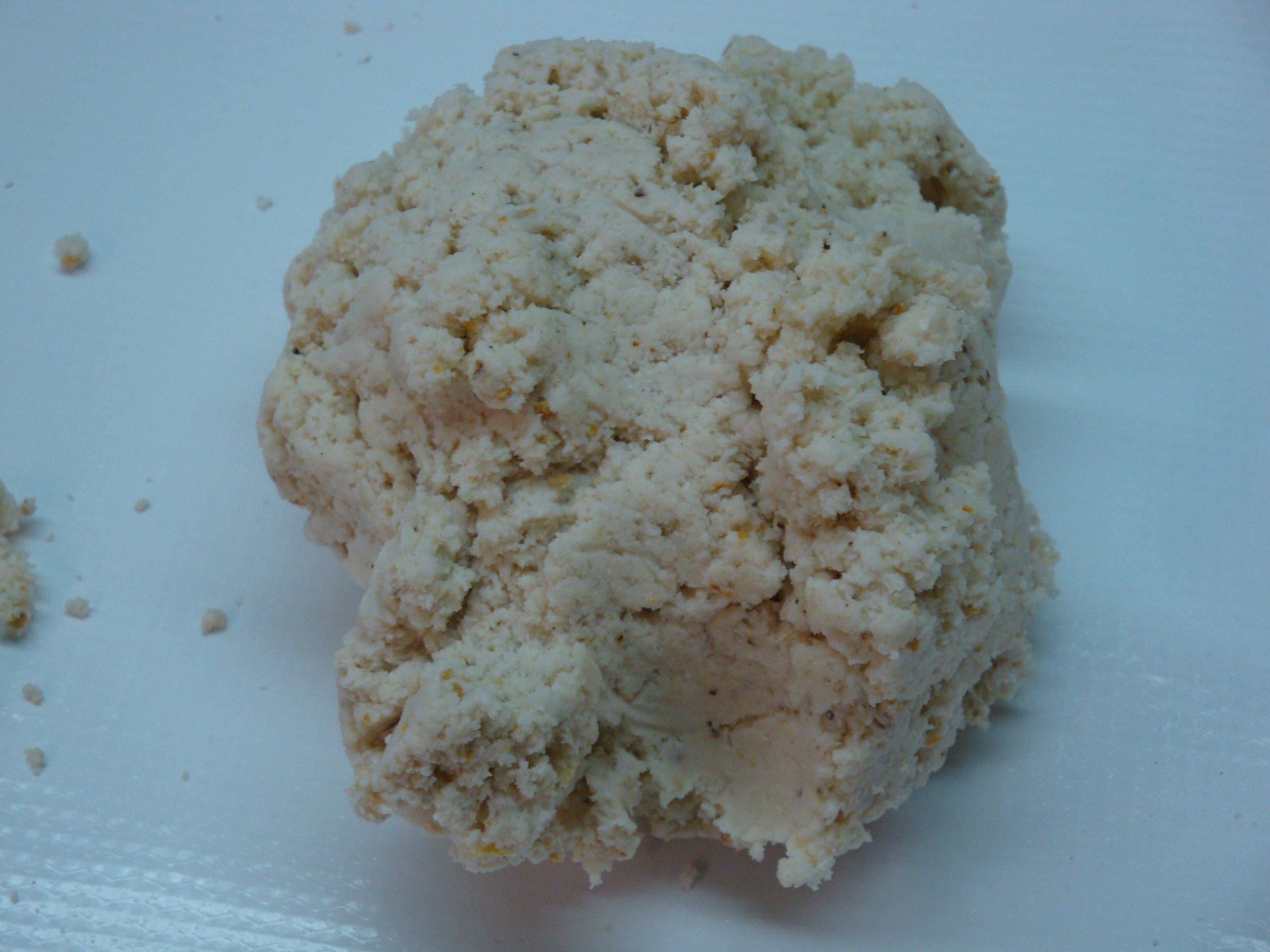 "Bola" de pozol blanco ya que no lleva cacao, (bebída originaria del estado de Tabasco) lista para su venta en un mercado de la ciudad de Villahermosa, estado de Tabasco, México.